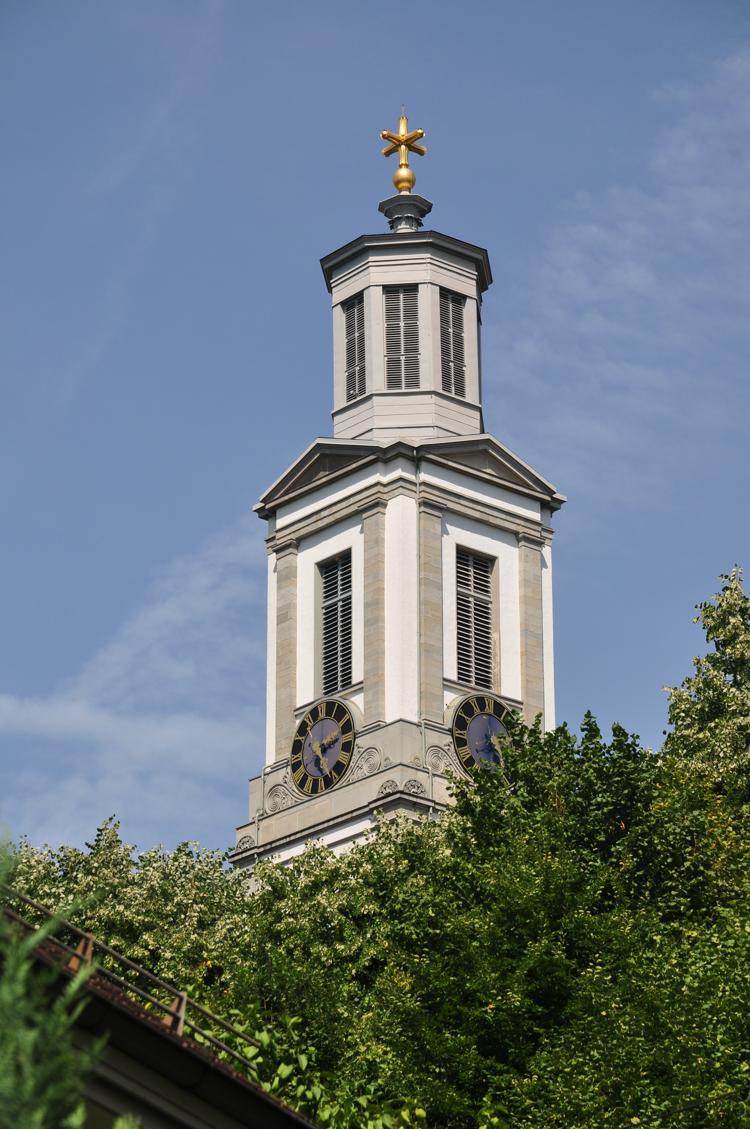 Kirche Neumünster in Zürich-Weinegg (Switzerland)